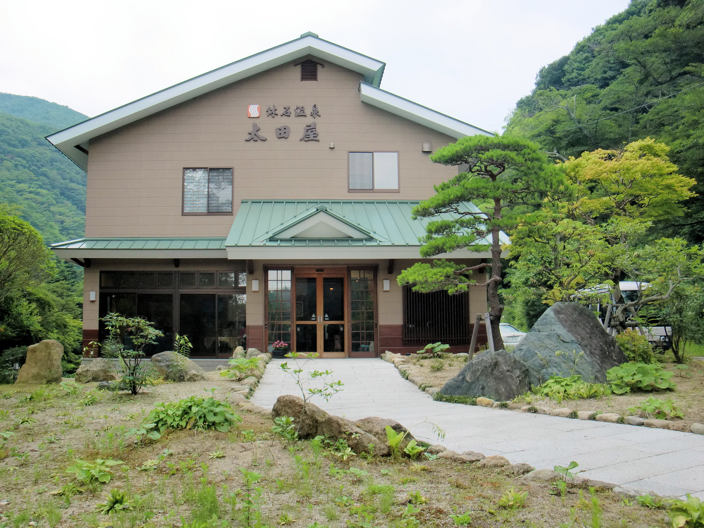 郡山市の休石温泉太田屋の建物